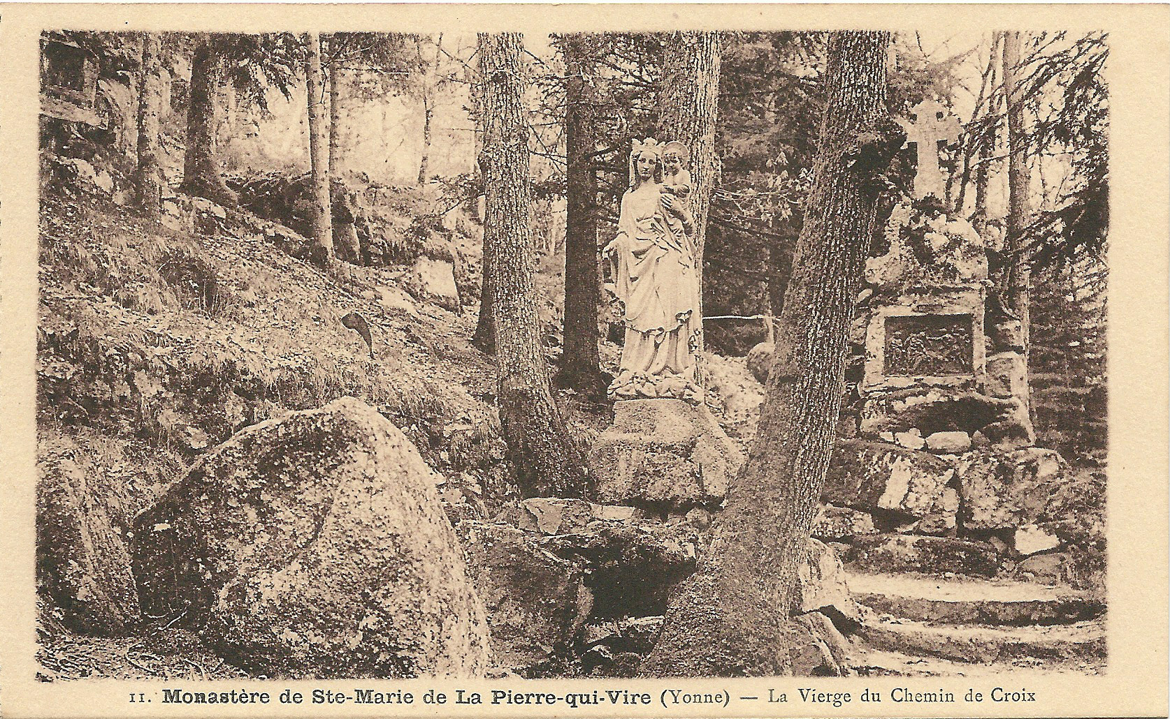 Saint-Léger-Vauban (Yonne, France) ; Monastère de La Pierre-qui-Vire